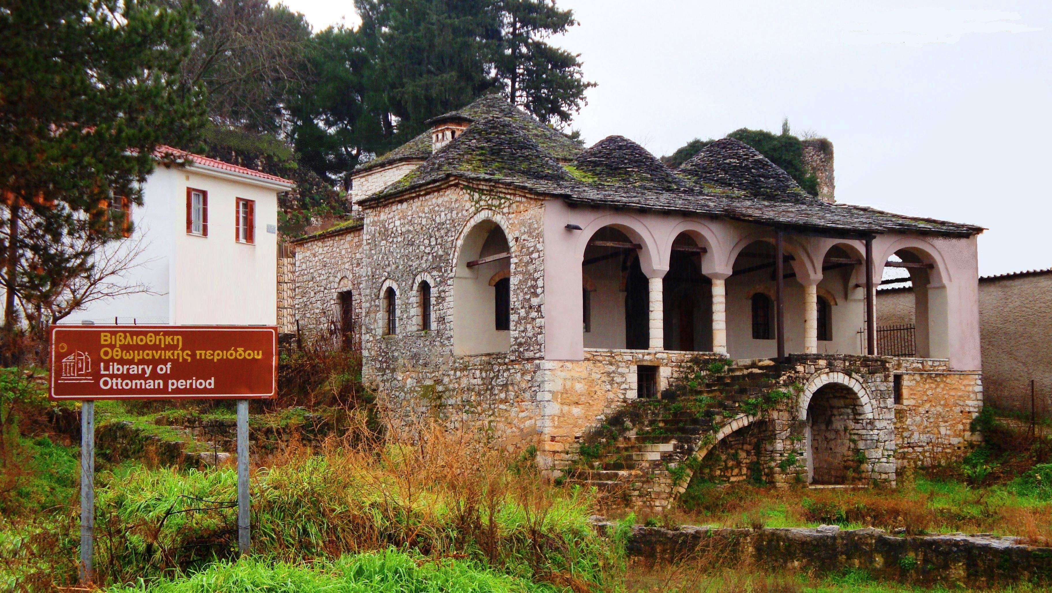 Βιβλιοθήκη Οθωμανικής Περιόδου